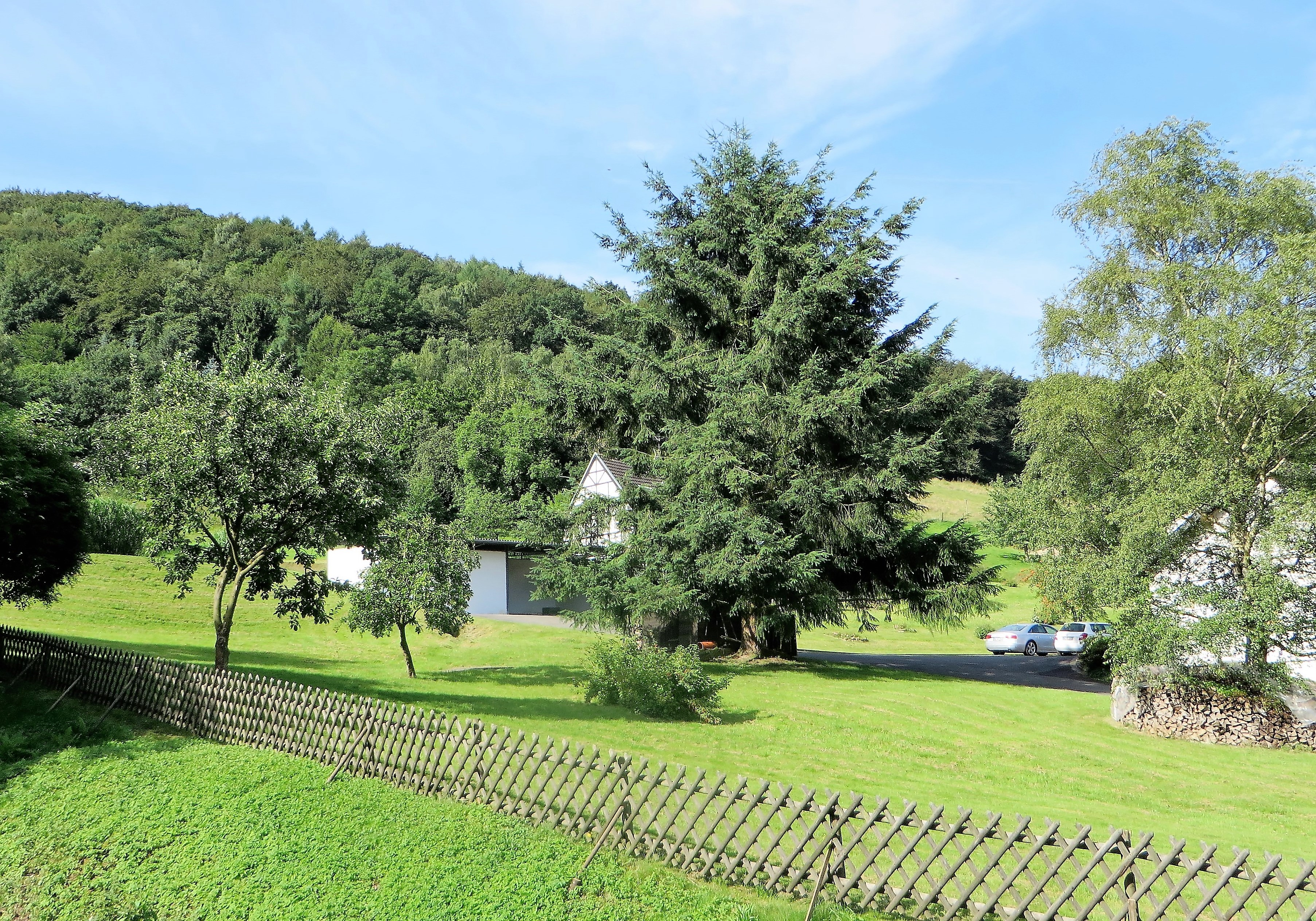 Naturschutzgebiet HA-024 „Aske“ in Hagen-Westerbauer. Das Schutzgebiet ist der im Hagener Stadtgebiet liegende Teilbereich des FHH-Gebiets „Gevelsberger Stadtwald“, zwischen Asker Straße und Voerder Straße, in zwei Teilbereiche getrennt. Blick von der oberen Kipperstraße (Foto) auf das im Hintergrund liegende Waldgebiet. Darin treten in den Kerbtälern naturnahe Bachläufe auf, an denen bachbegleitende Erlen-Eschenwälder stocken. Die großflächigen Hainsimsen-Buchenwälder sind gut erhalten und besitzen eine hervorragende Repräsentanz für den Nordwesten des Naturraumes Märkisches Sauerland.